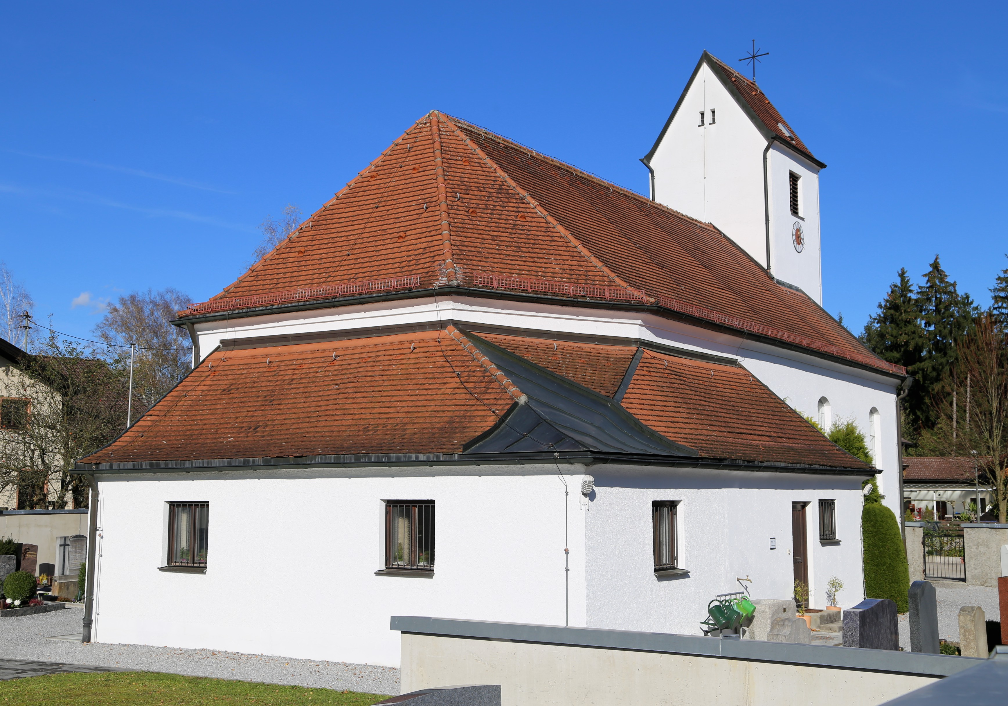 Hauptstraße 6; Kath. Kuratiekirche St. Theresia von Lisieux, Saalbau mit westlichem Sattelturm, 1928; mit Ausstattung. D-1-87-165-15